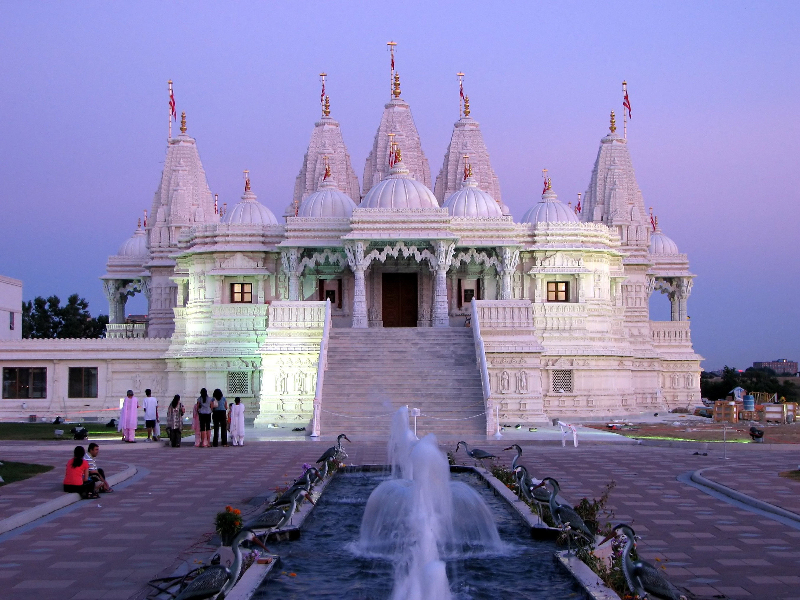 BAPS Shri Swaminarayan Mandir, Toronto, CanadaBAPS Shri Swaminarayan Mandir, Toronto